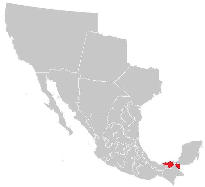 Mapa de Tabasco durante su separación de México en 1841. Tabasco decretó su separaci{on de México el 13 de febrero de 1841 en protesta por la implantaci{on de la República Centralista y por las sanciones impuestas al estado por el Presidente Anastasio Bustamante. Reincorporándose oficialmente a M{exico el 2 de diciembre de 1842.